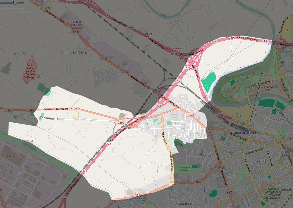 Mapa del distrito Miralbueno en Zaragoza.